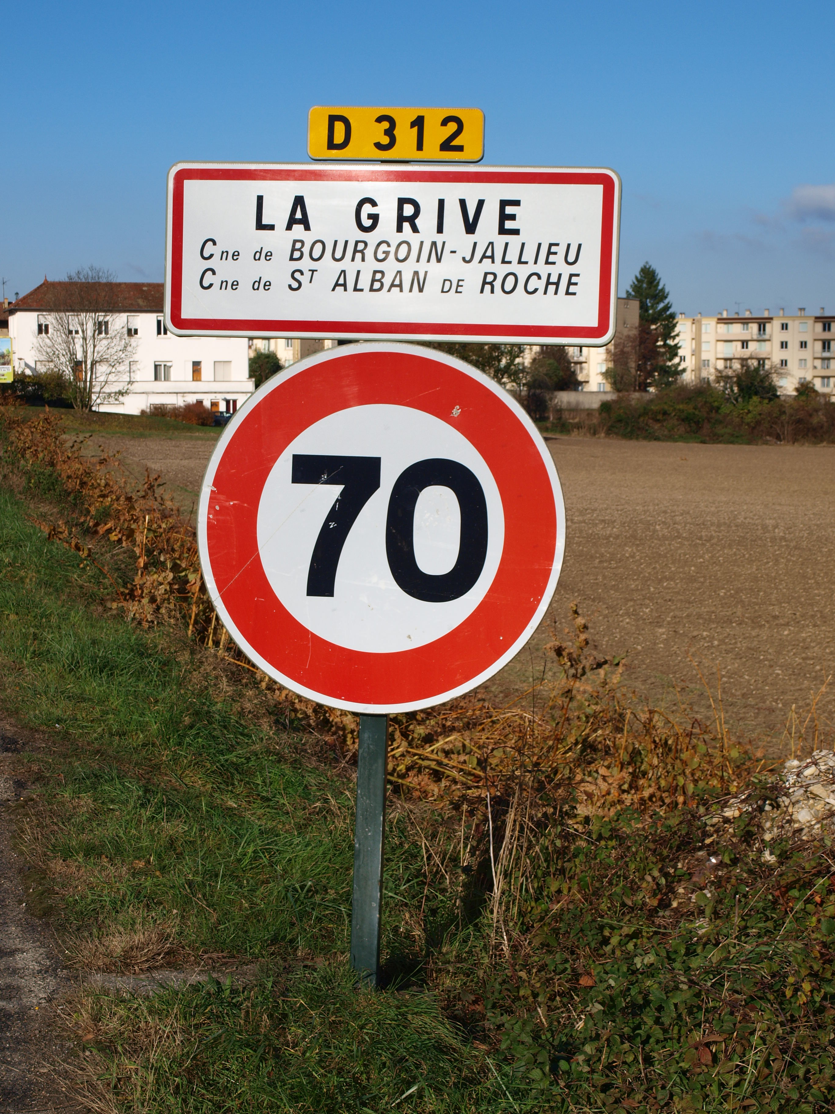 La Grive (Isère, France) ; panneau d'agglomération